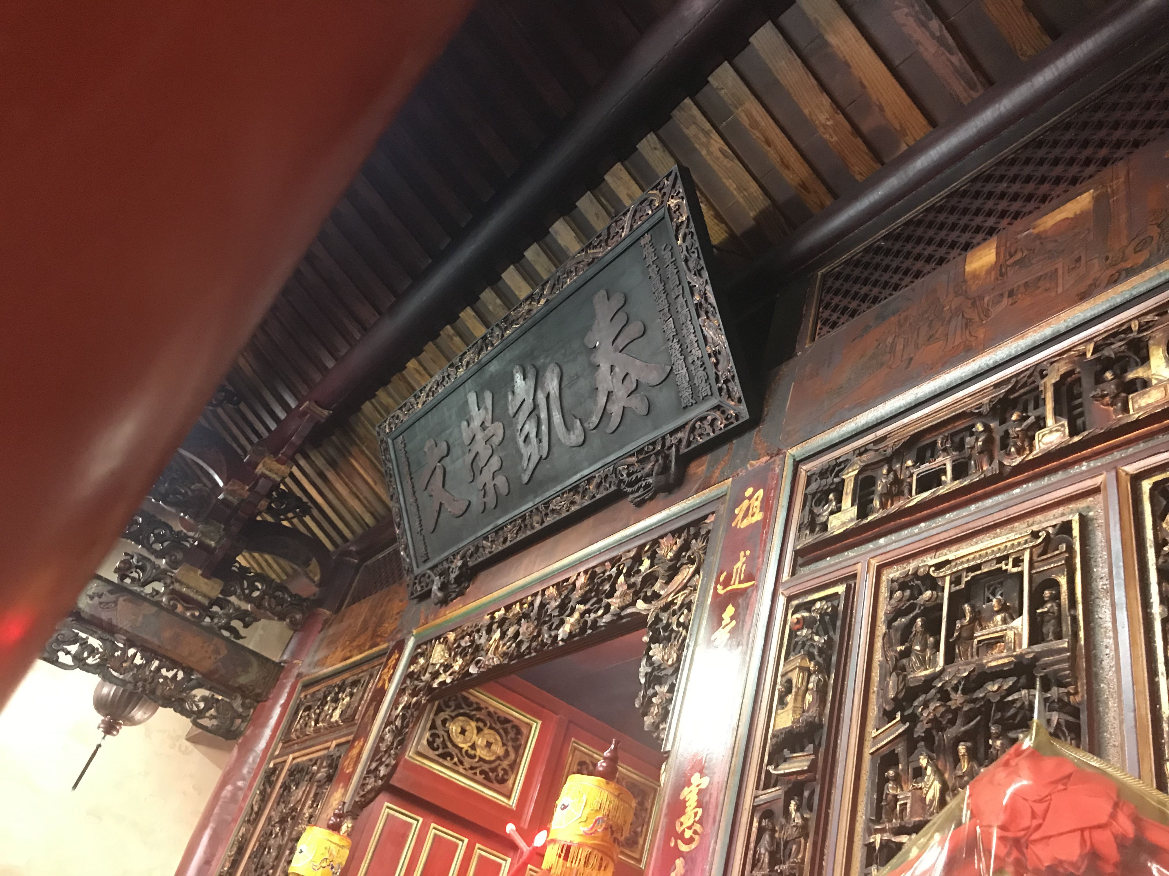 藍田書院「奏凱崇文」匾